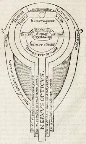 Dessin de l'œil dans le livre d'Ibn a-Haytham ; texte latin d'une édition de 1572. BnF Gallica : Opticae thesaurus : Alhazeni Arabis libri septem nunc primum editi ; ejusdem Liber de crepusculis et nubium ascensionibus. Item Vitellonis,... libri X / Omnes instaurati... adjectis etiam in Alhazenum commentariis, a Federico Risnero... Texte latin, édition de 1572.